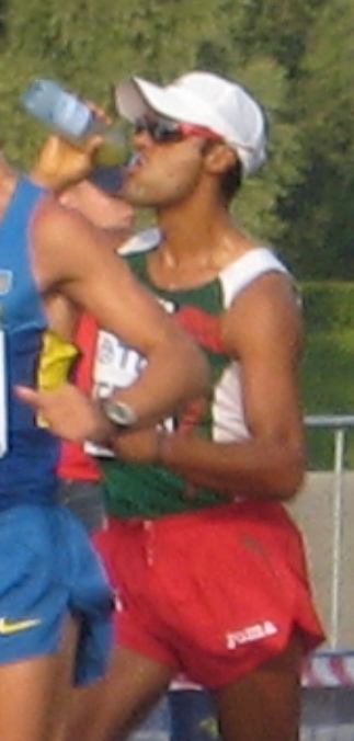 Чемпионат мира по лёгкой атлетике 2013. Ходьба 50 км, мужчины. Пелотон